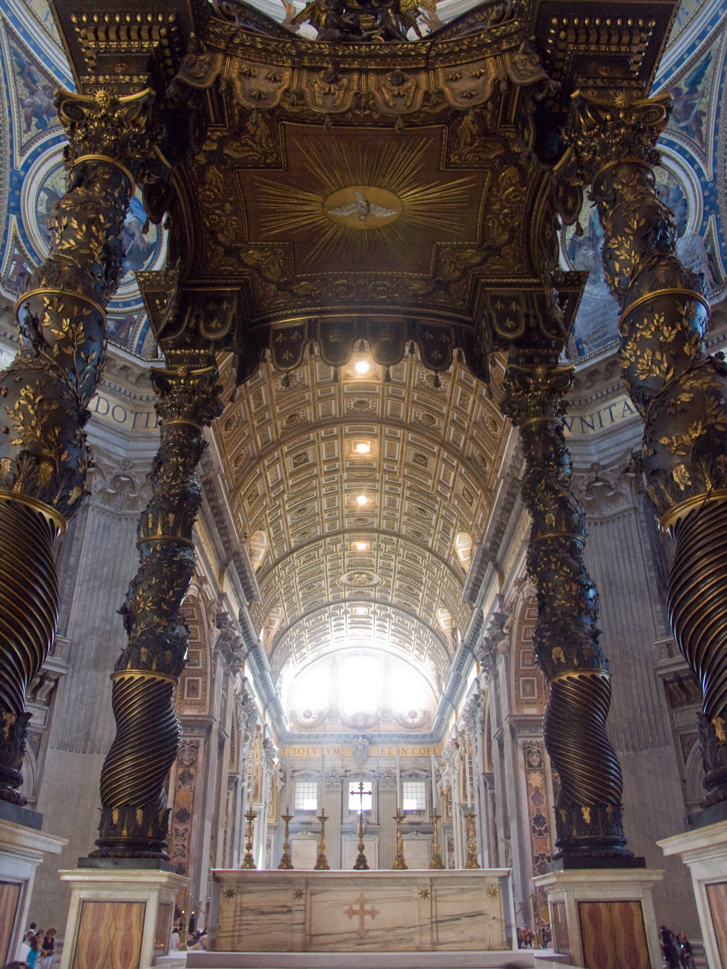 Vatican, Basilique St Pierre, Intérieur